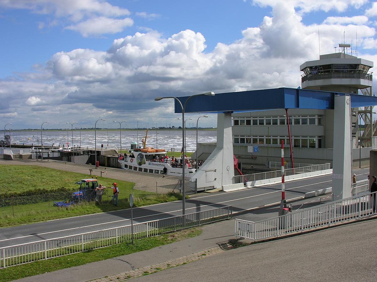 Anlage des Eidersperrwerks mit Kontrollturm Schleuse und Klappbrücke Foto 2008 Wolfgang Pehlemann Wiesbaden